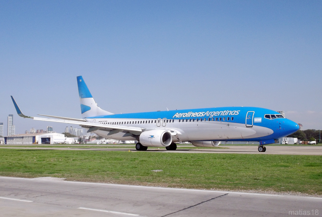 Boeing 737-800 de Aerolíneas Argentinas matricula LV-CTB en rodaje hacia la cebecera 13 del Aeroparque Jorge Newbery en Buenos Aires, Argentina.